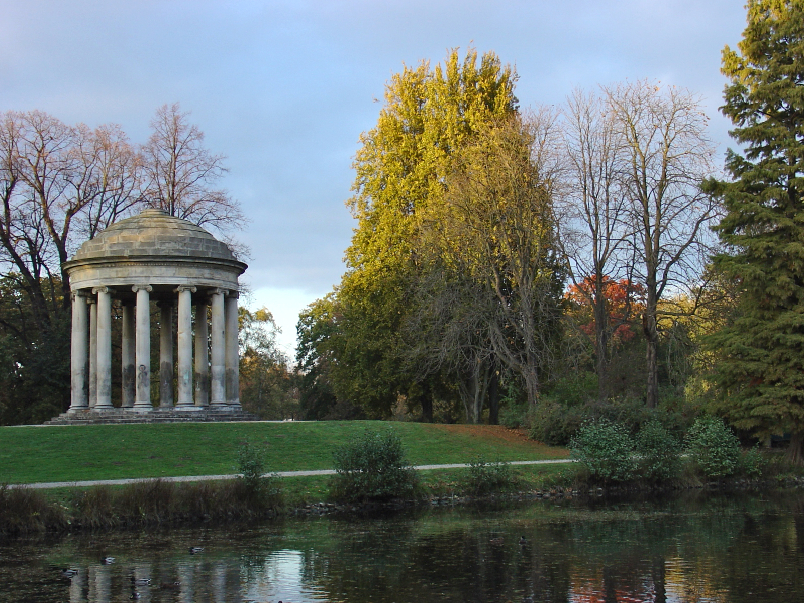 Leibniztempel im Georgengarten in Hannover-Herrenhausen, Deutschland